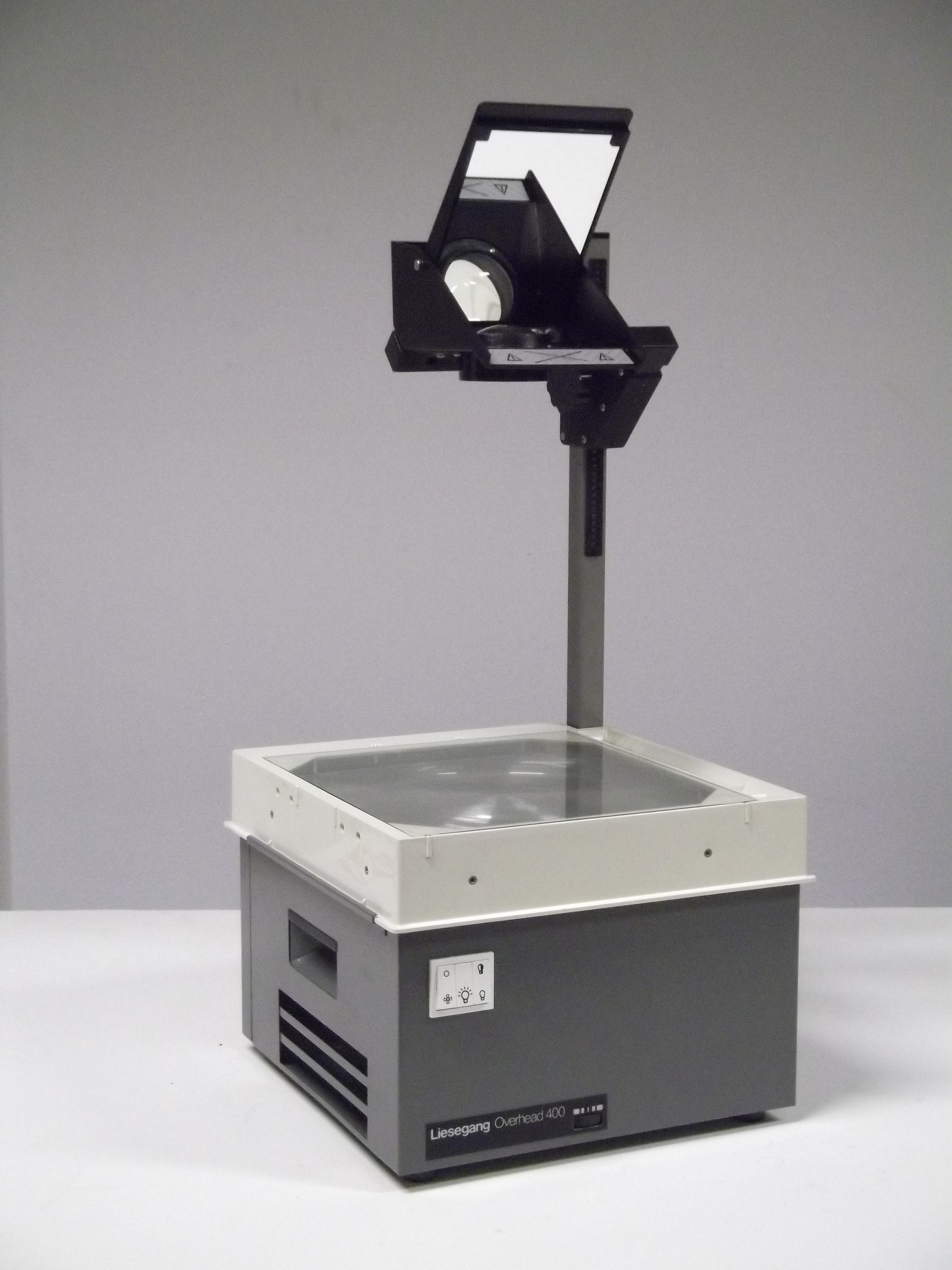 Liesegang OHP Typ 610, Lampe 36V 400W, Format 285 x 285 mm, f=315 mm